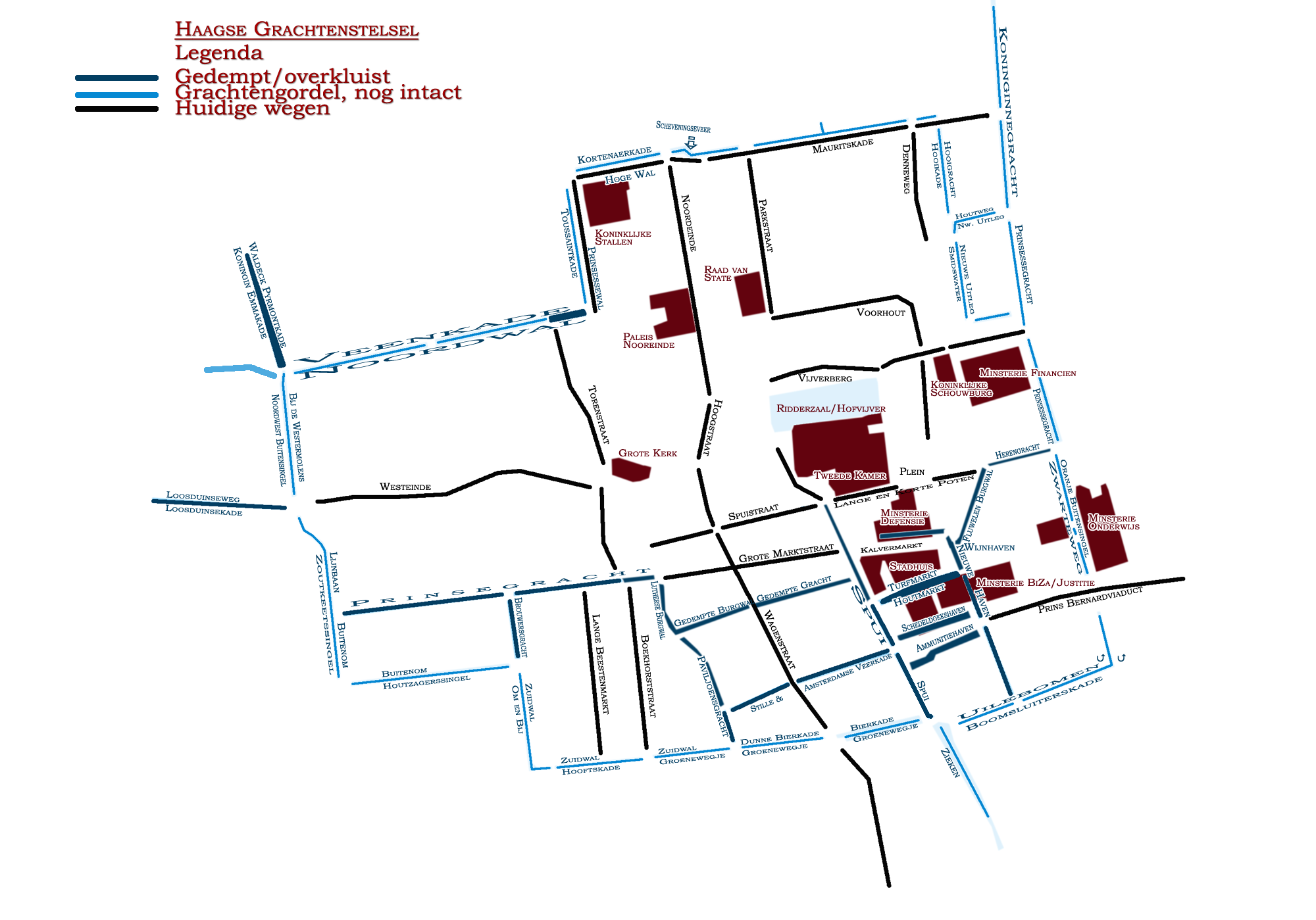 Haagse grachtengordel schematische weergegeven